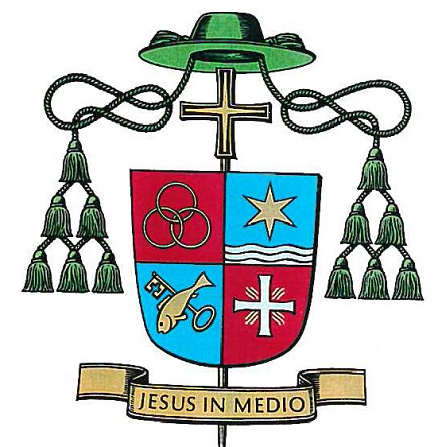 Bischofswappen Joachim Reinelt